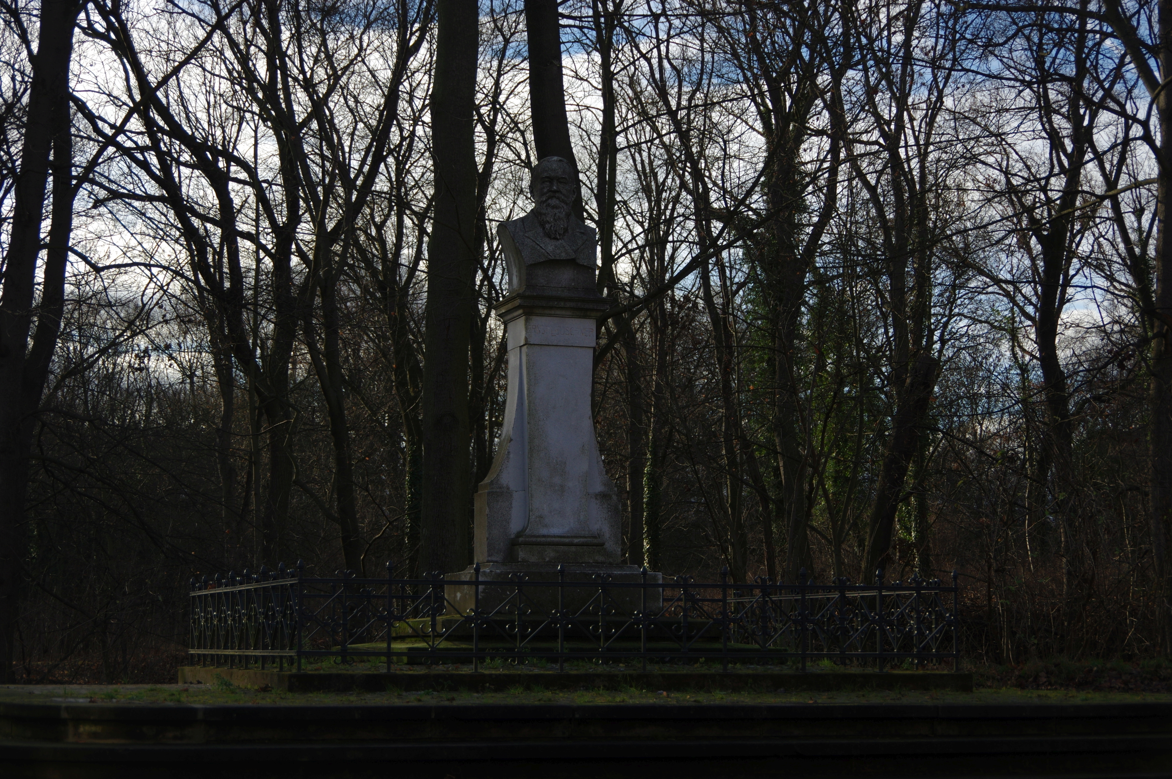 Lutherstadt Eisleben. Das Haus (Adresse befindet sich im Dateinamen) ist denkmalgeschützt.